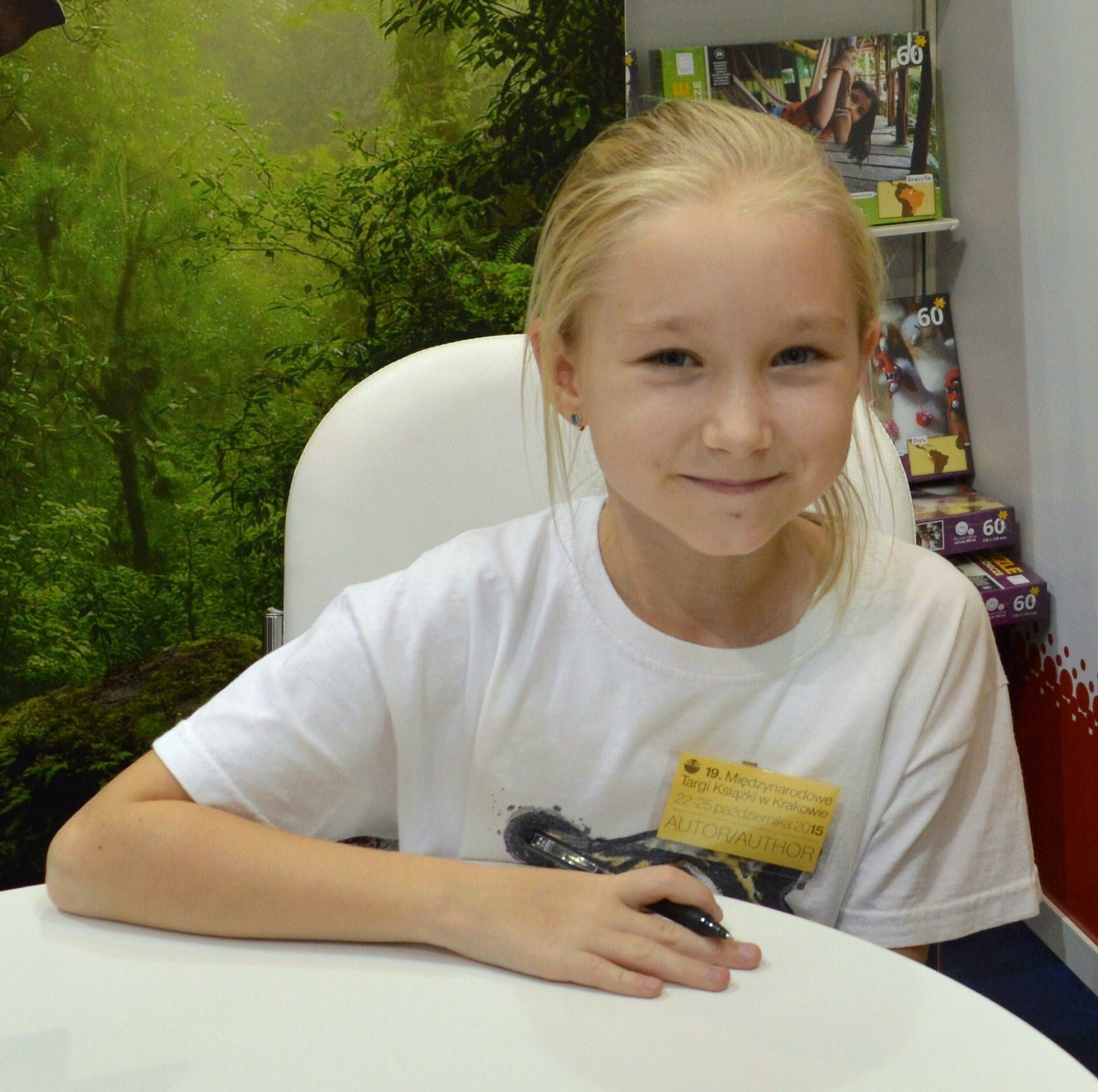 Nela mała reporterka. 19. Międzynarodowe Targi Książki w Krakowie.